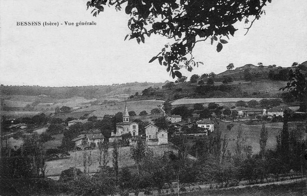 Bessin (Isère) vue générale